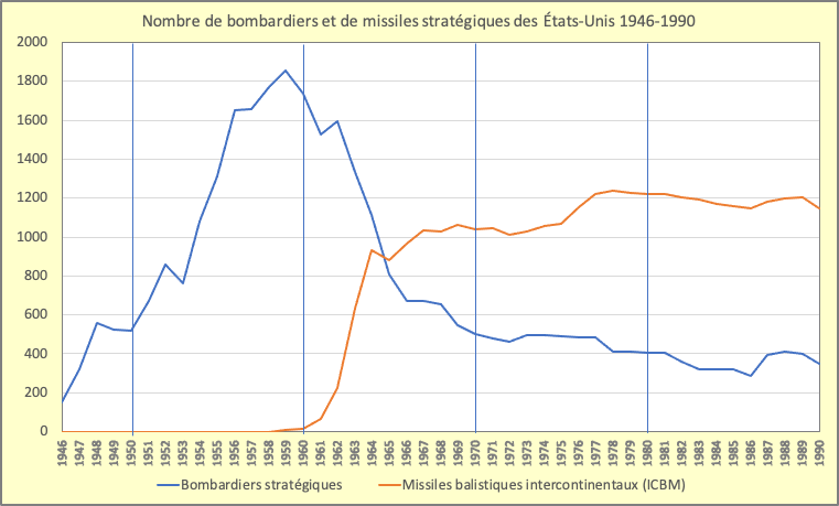 Nombre de bombardiers stratégiques et de missiles intercontinentaux des États-Unis durant la guerre froide - Données au 31 décembre de chaque année figurant dans le document Alert Operations and the Strategic Air Command 1957-1991